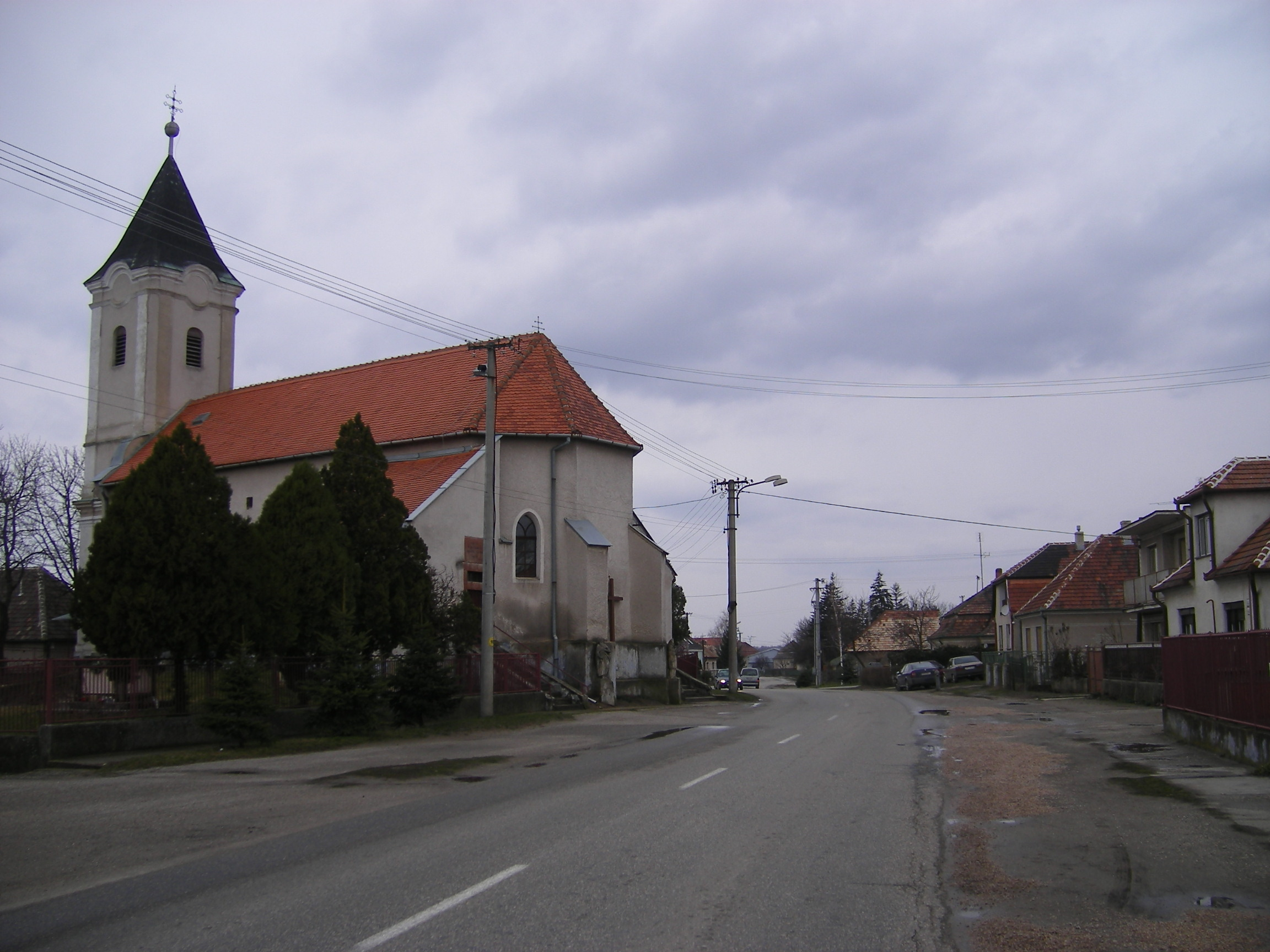 Marcelháza - Fő utca és a katolikus templom